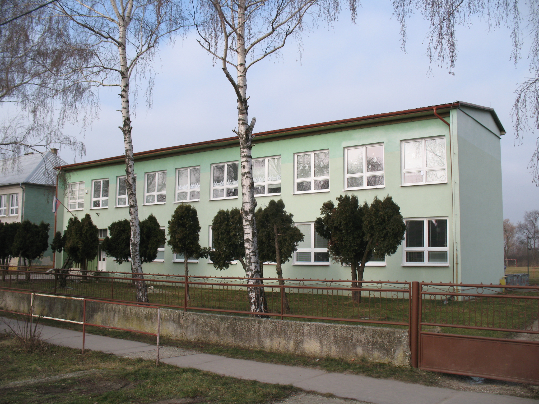 Nyitramalomszeg